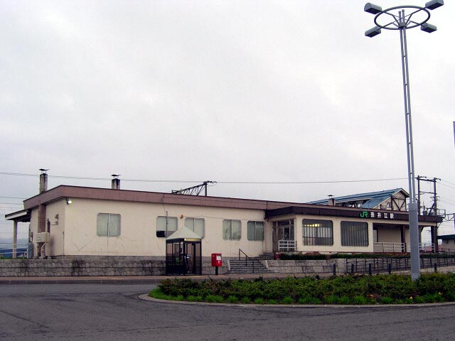 駅舎 撮影場所 奈井江駅駅前広場より 撮影者によるGFDLリリース